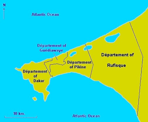 Carte de Dakar